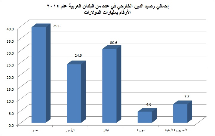 إجمالي رصيد الدين الخارجي في عدد من البلدان العربية عام 2014 مصدر البيانات البنك الدولي